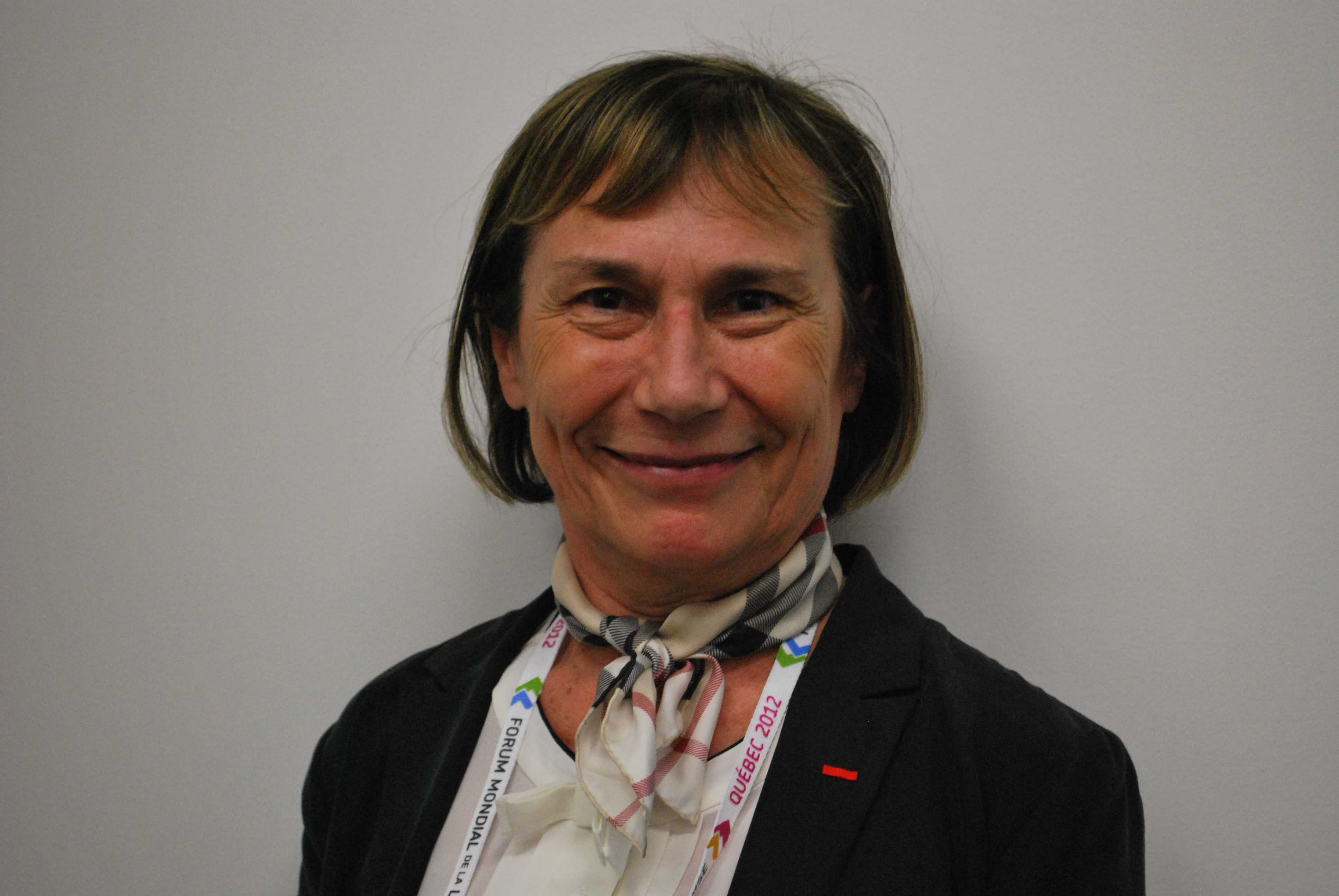 Catherine Barthélémy au Forum mondial de la langue française